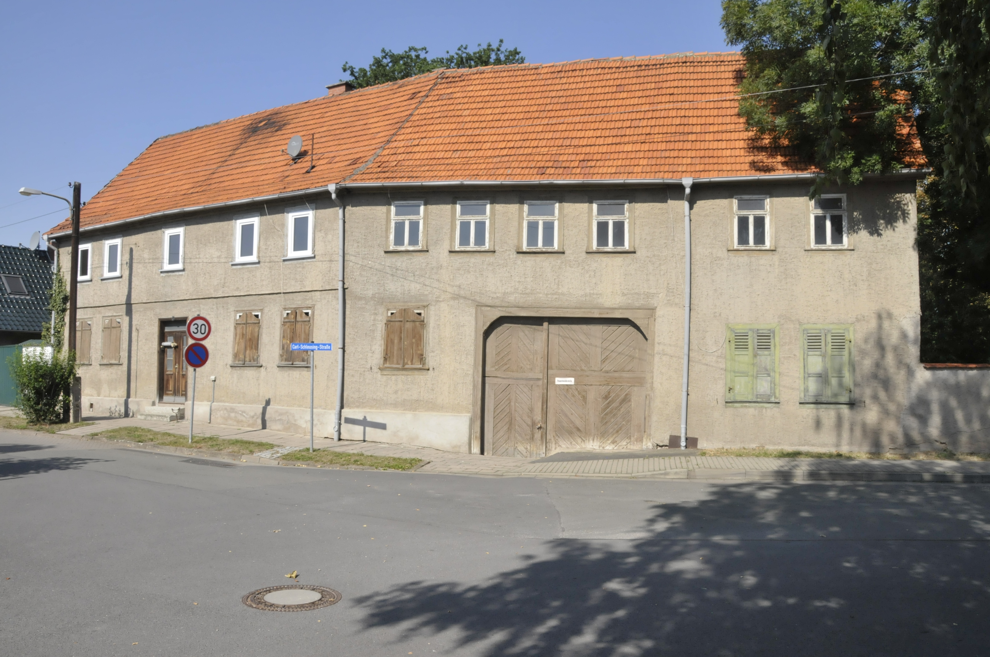 Tunzenhausen, Carl-Schleusing-Straße 7